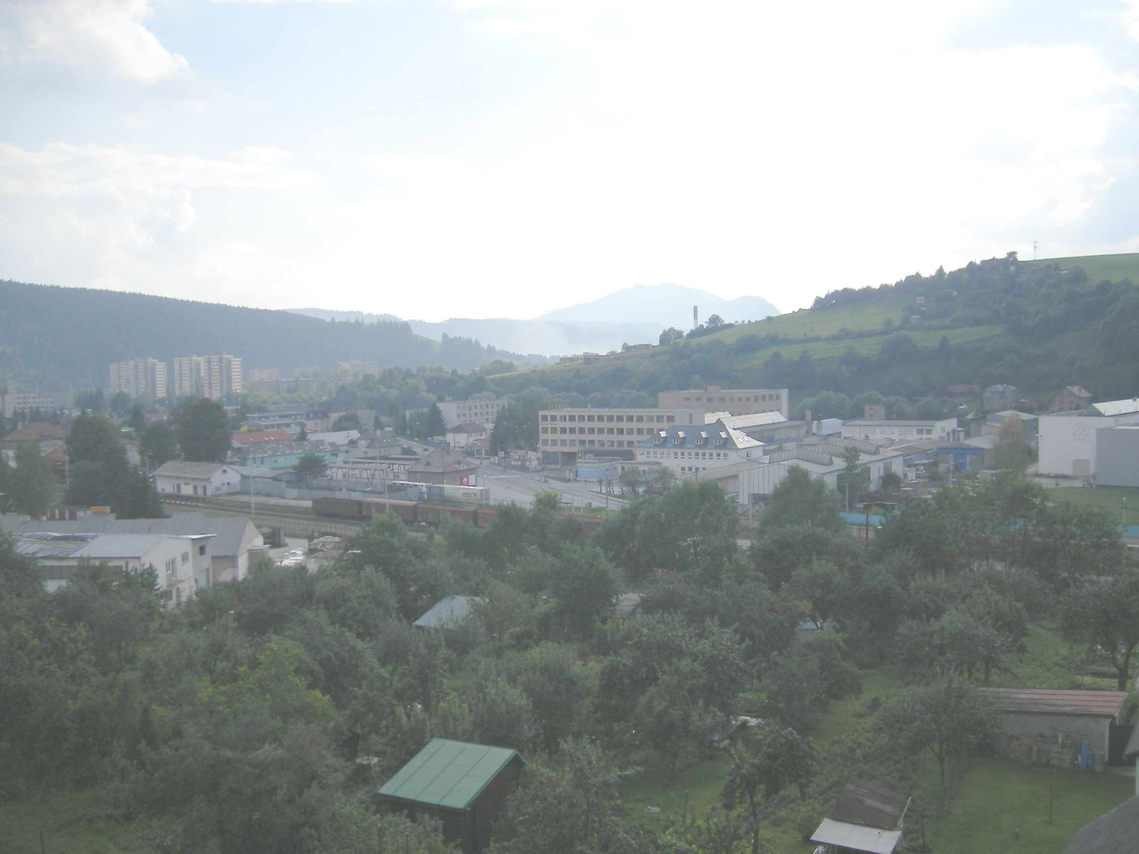 Dolný Kubín